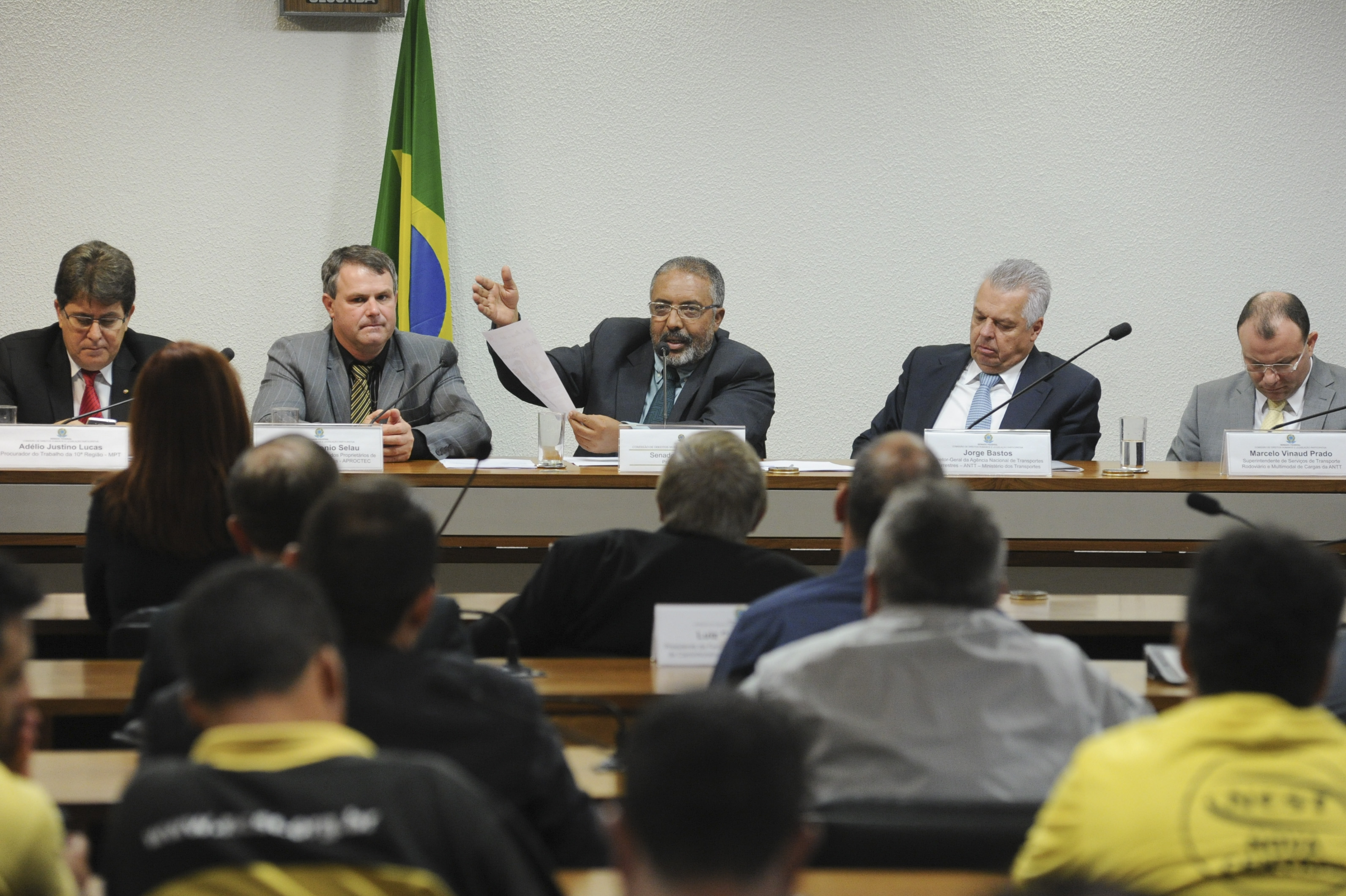 Sala de comissões do Senado durante audiência pública interativa da Comissão de Direitos Humanos e Legislação Participativa (CDH). A CDH debate a situação dos caminhoneiros no país. A categoria parou e bloqueou estradas em todo o país em protesto contra a alta do diesel, reajuste do preço do frete e pela redução dos pedágios em rodovias. Mesa (E/D): procurador do trabalho da 10ª Região, Adélio Juastino Lucas; representante da Associação dos Proprietários de Caminhões de Três Cachoeiras/RS (Aproctec), Nelson Antonio Selau; presidente da CDH, senador Paulo Paim (PT-RS); diretor-geral da Agência Nacional Transportes Terrestres (ANTT), Jorge Bastos; Superintendência de Serviços de Transporte Rodoviário e Multimodal de Cargas da ANTT, Marcelo Vinaud. Foto: Geraldo Magela/Agência Senado